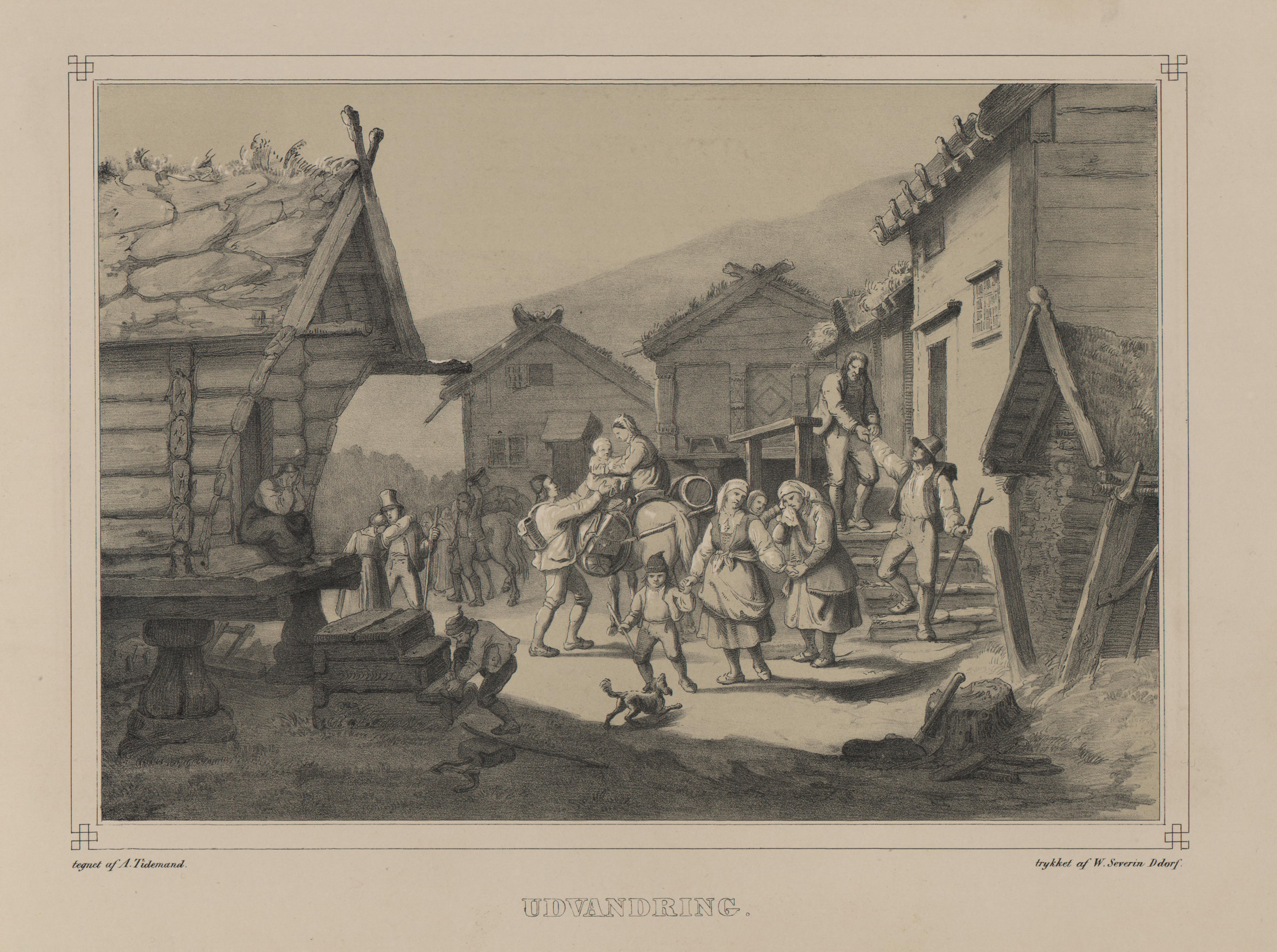 Illustrasjon hentet fra boken "Norge fremstillet i Tegninger" av Asbjørnsen, P.Chr. og utgitt av Chr. Tønsberg (no, 1848)